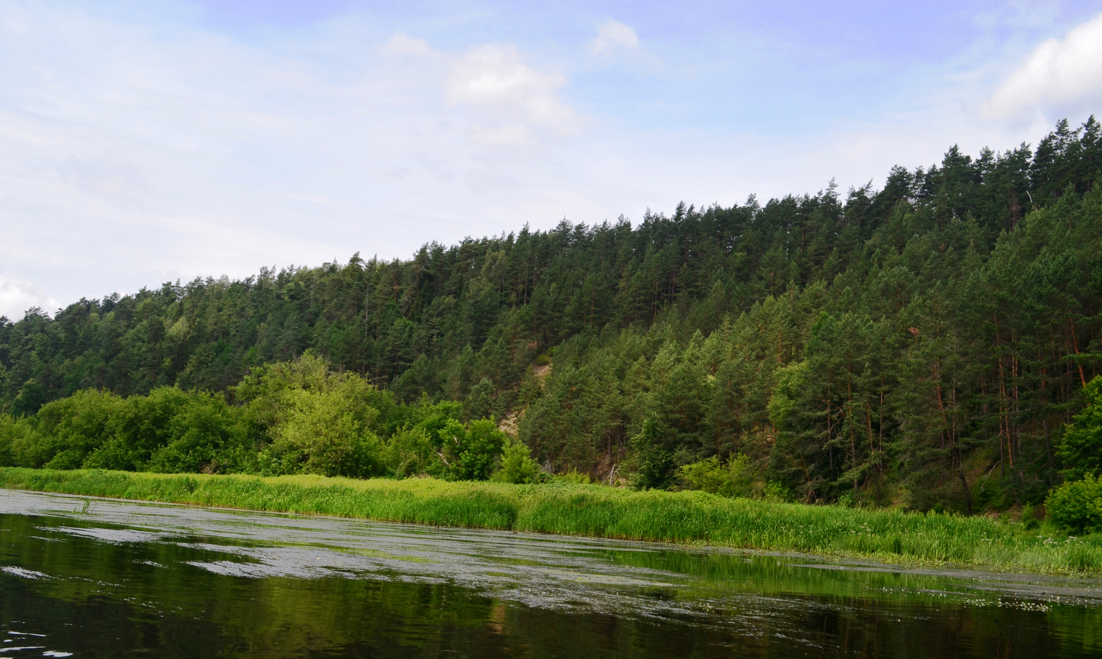 Paneriškių skardis ir Panerių miškai, Elektrėnų sav.